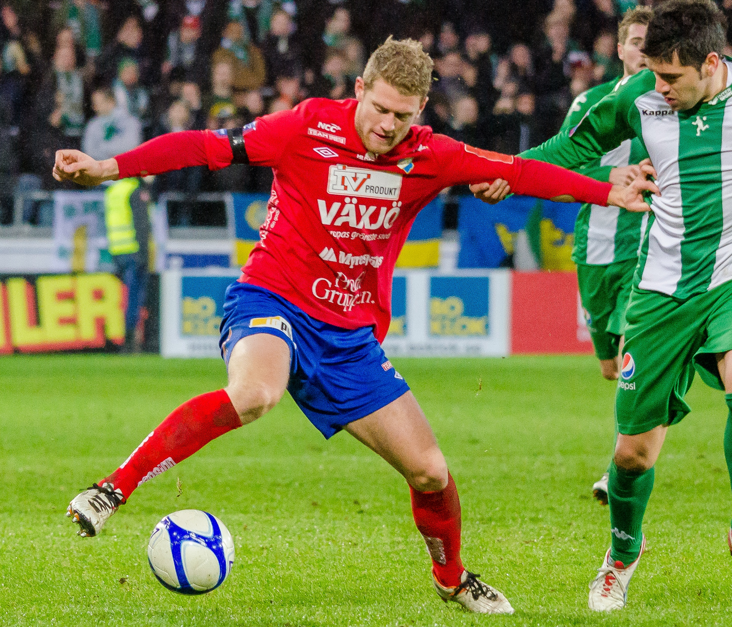 Österspelaren Stefan Karlsson i säsongens sista match 2012 mot Hammarby på Myresjöhus Arena.